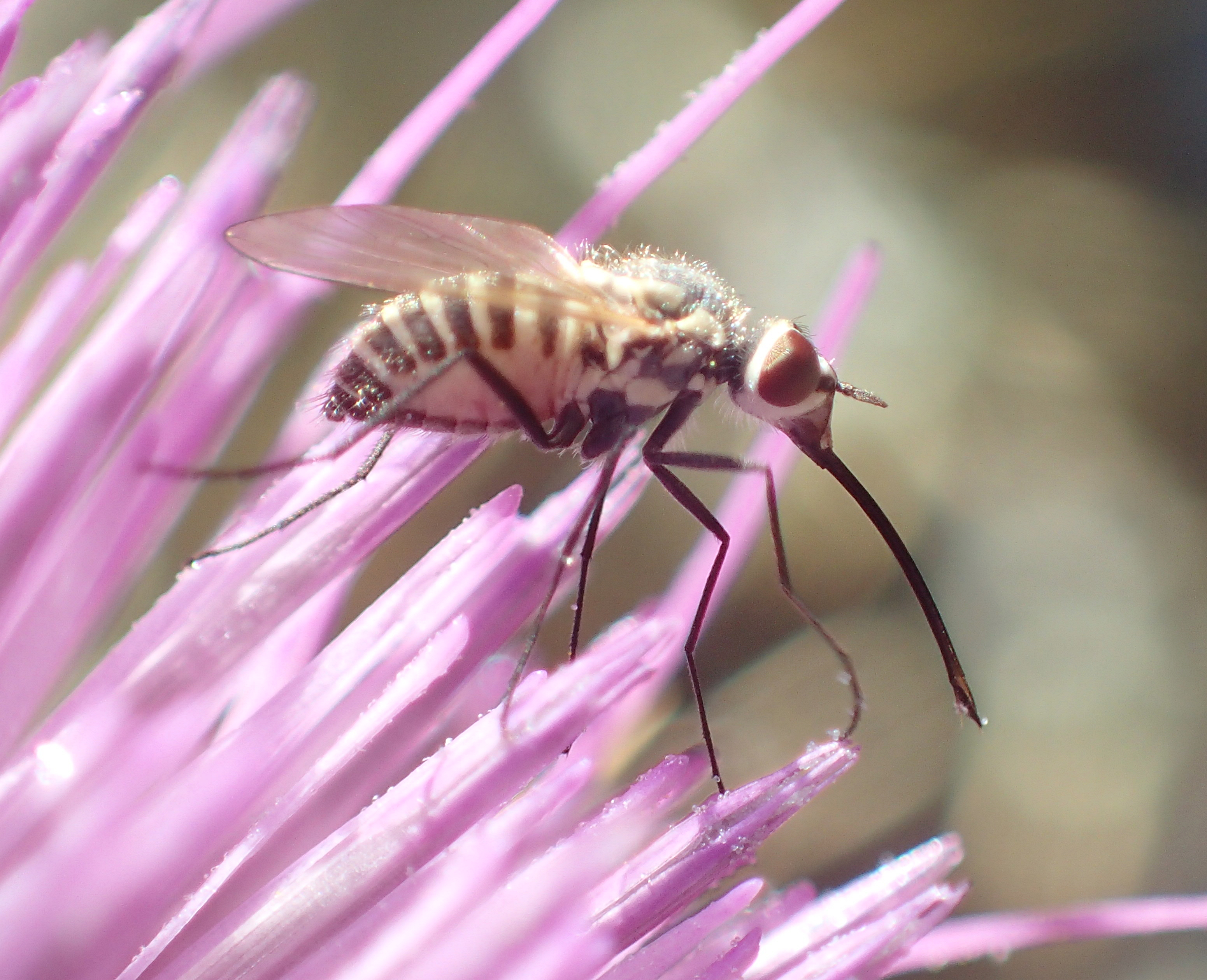 Phthiria vagans aus Griechenland, Peloponnes, zwischen Levidi und Nemea, 1260 m hoch